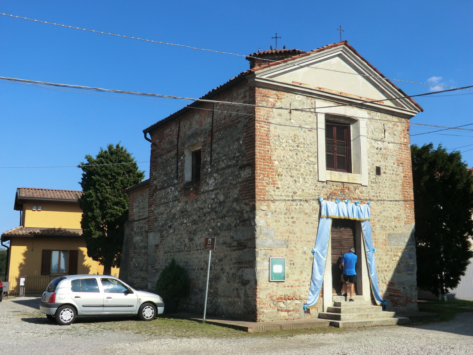 Oratorio di Mocchirolo Native nameOratorio di MocchiroloLocationLentate sul Seveso, Lombardy, ItalyCoordinates45° 40′ 40.24″ N, 9° 07′ 55.67″ E